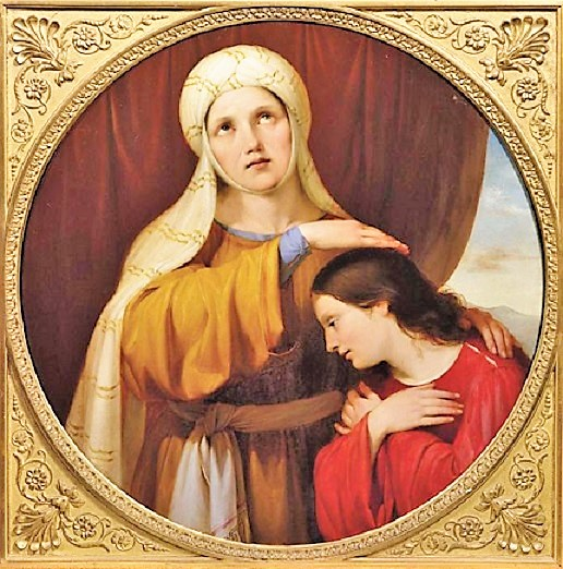 Benedizione di Giacobbe, olio su tela, diam. 62 cm., collezione privata